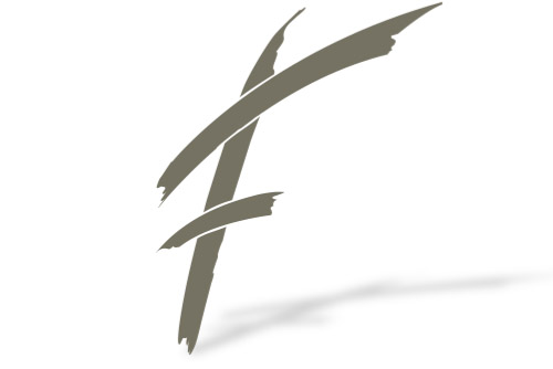 Nouveau Logo du Groupe F en 2017